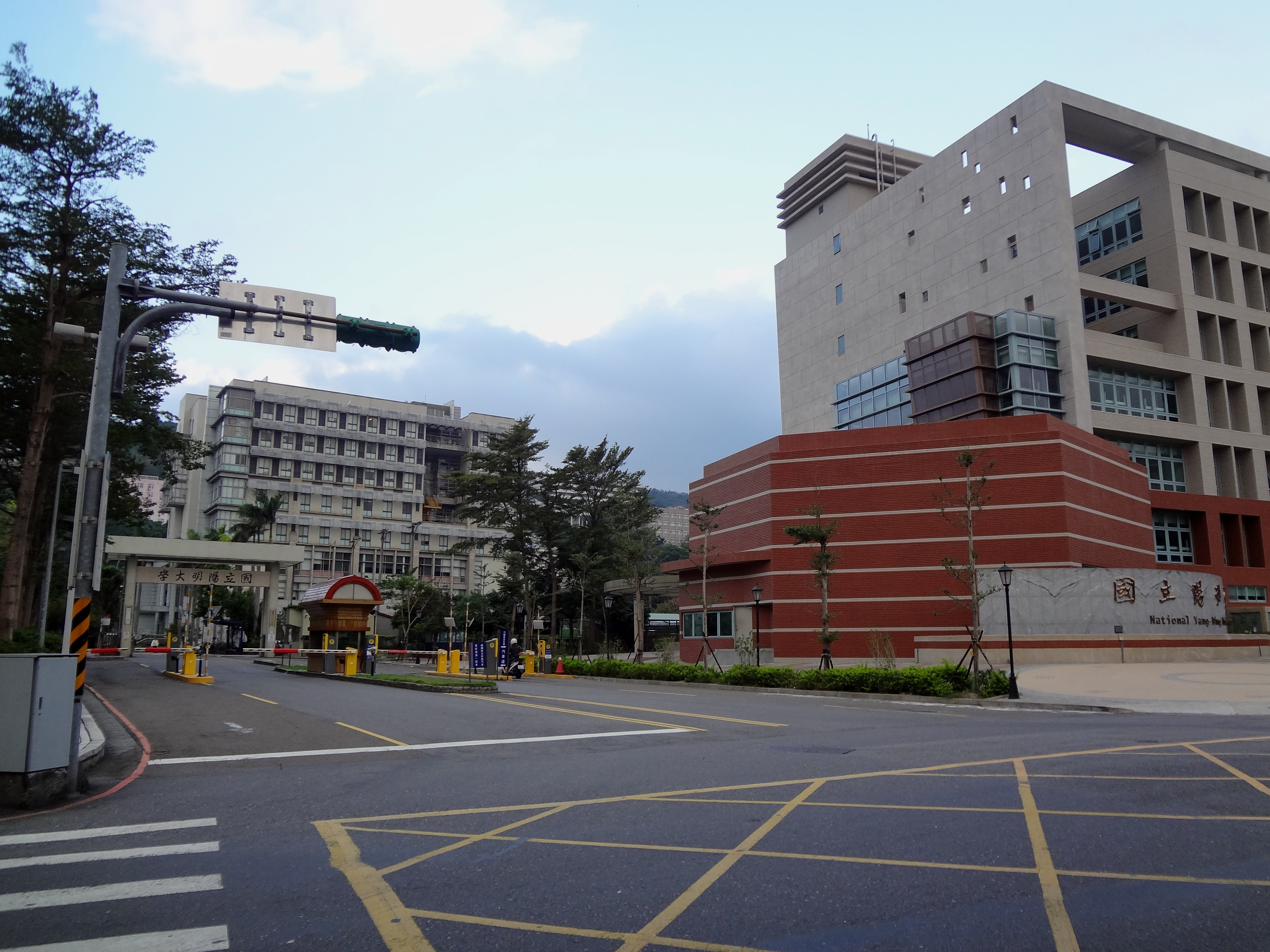 中文（台灣）: 國立陽明大學，位於臺北市北投區立農街二段155號。